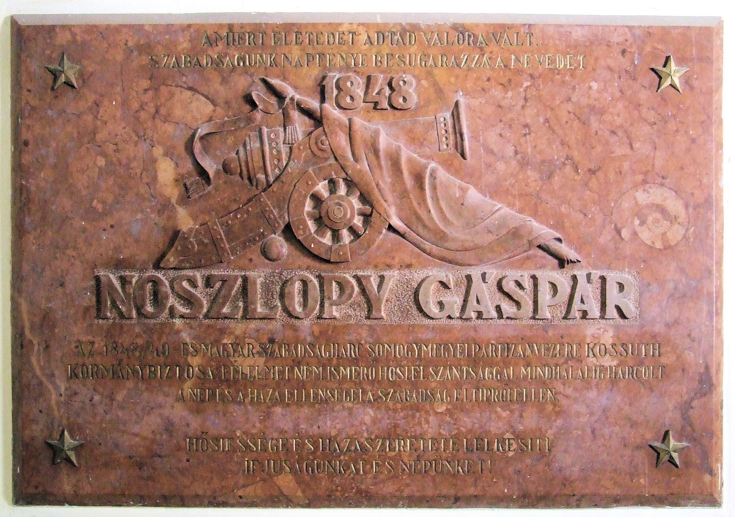 Noszlopy Gáspár emléktábla a kaposvári Rippl-Rónai Múzeum előcsarnokában